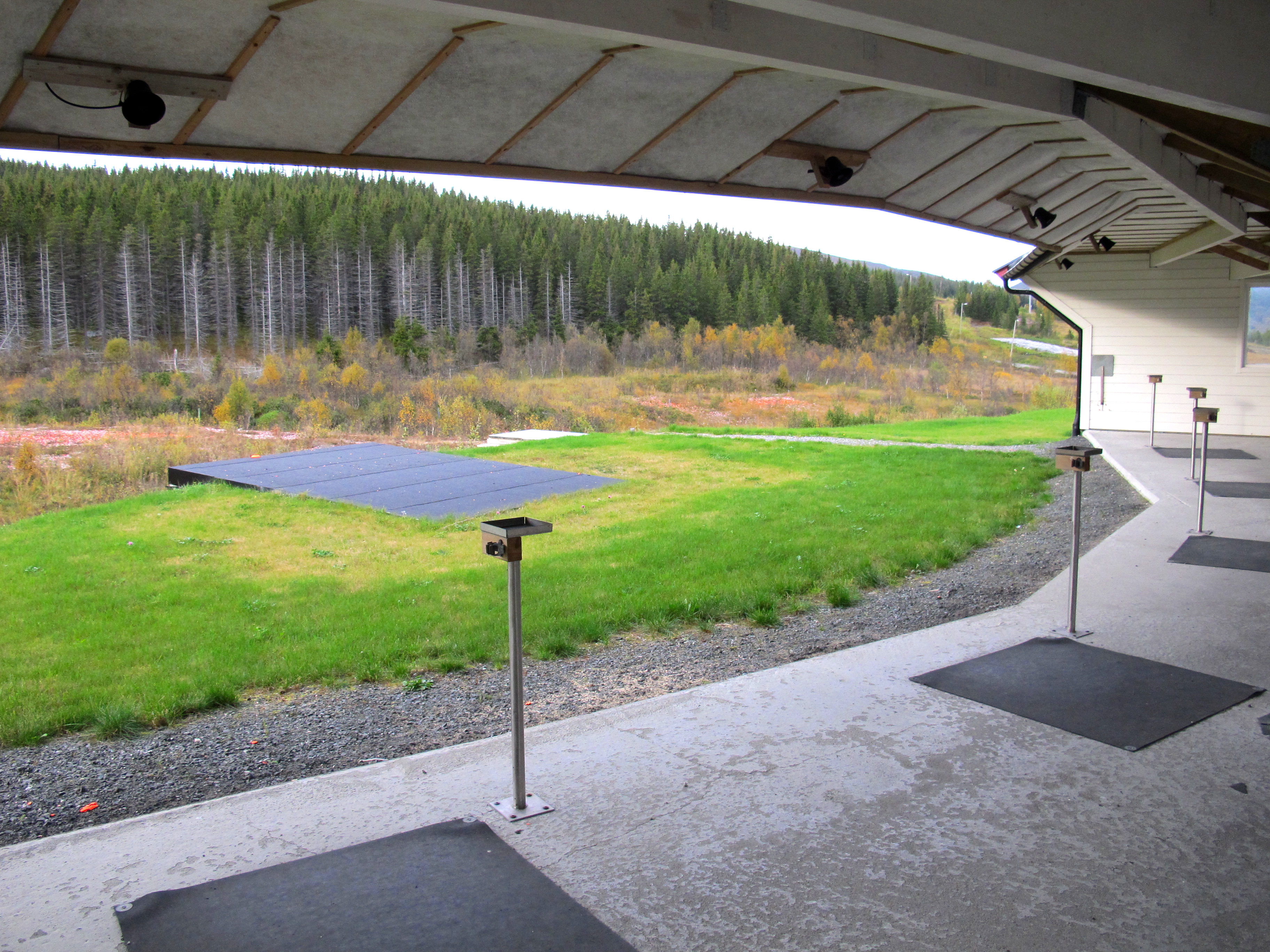 Banen har 5 standplasser